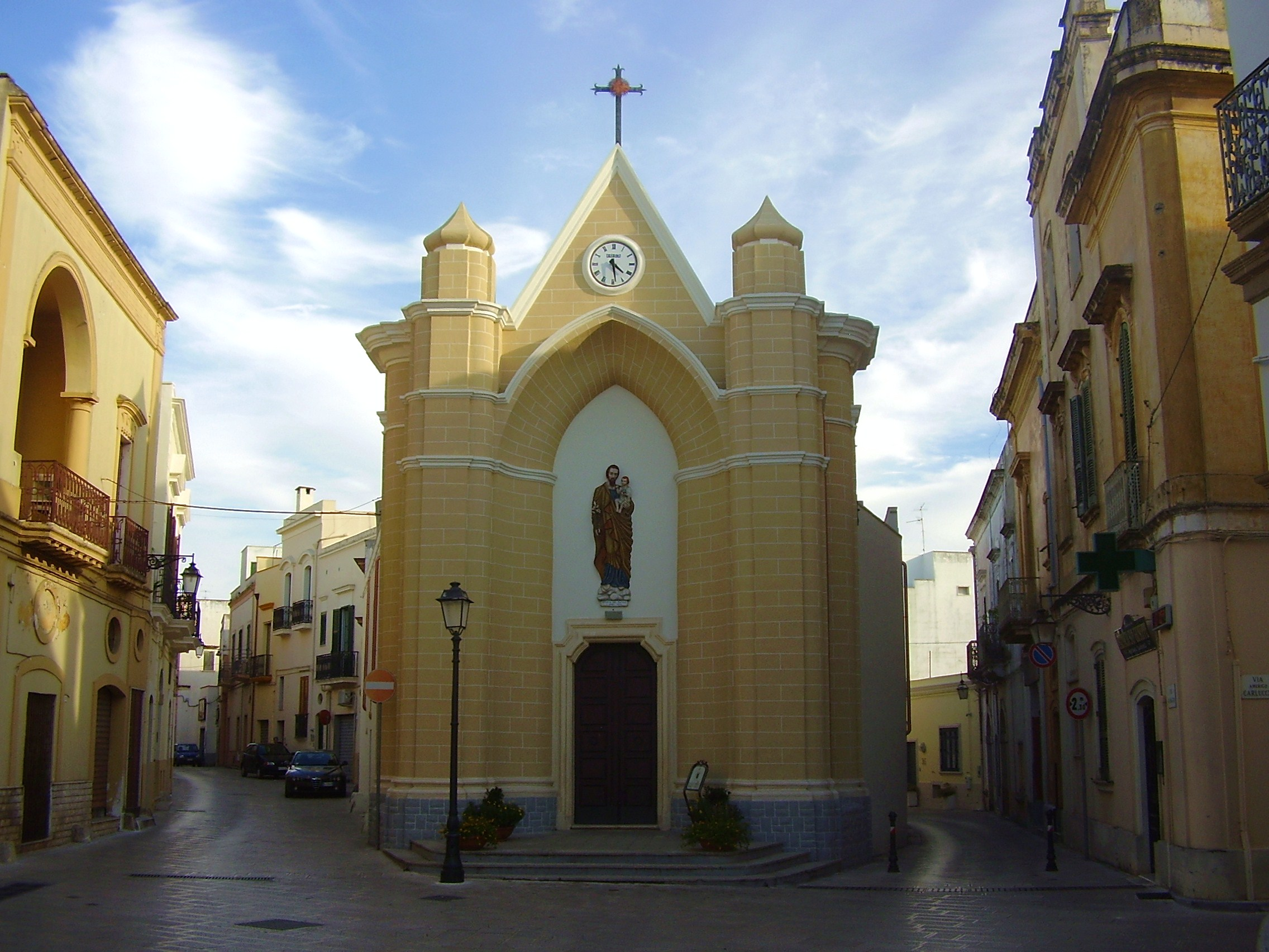 Chiesa di san Giuseppe Tuglie, Lecce